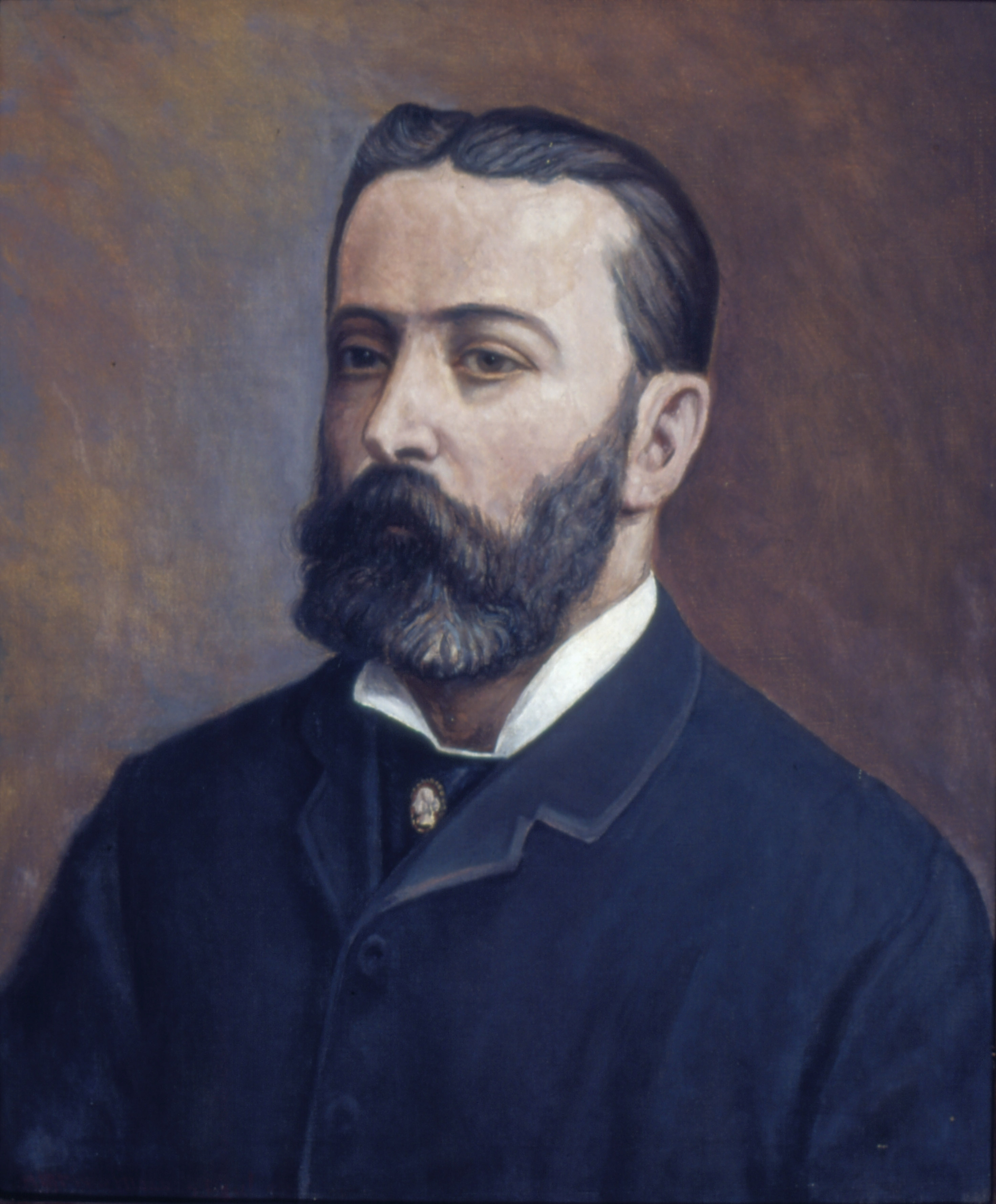 Obra que integra o acervo do Museu Paulista da USP. Coleção Fundo Museu Paulista - FMP